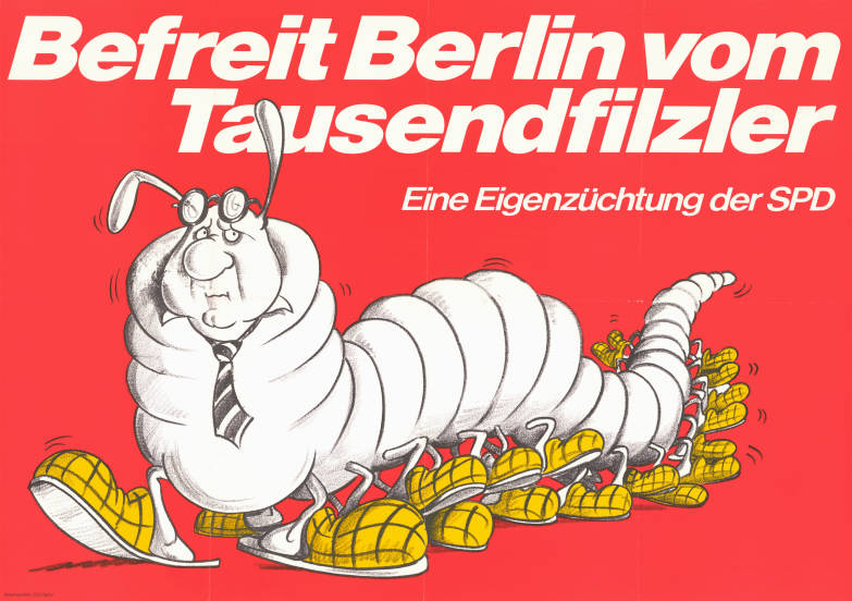 Befreit Berlin vom Tausendfilzer Eine Eigenzüchtung der SPD Abbildung: Dietrich Stobbe als Tausendfilzer (Karikatur) Plakatart: Motiv-/Textplakat Auftraggeber: Verantw.: CDU Berlin Objekt-Signatur: 10-004 : 506 Bestand: Plakate zu Abgeordnetenhauswahlen Berlin (10-004) GliederungBestand10-18: Plakate zu Abgeordnetenhauswahlen Berlin (10-004) » CDU Lizenz: KAS/ACDP 10-004 : 506 CC-BY-SA 3.0 DE